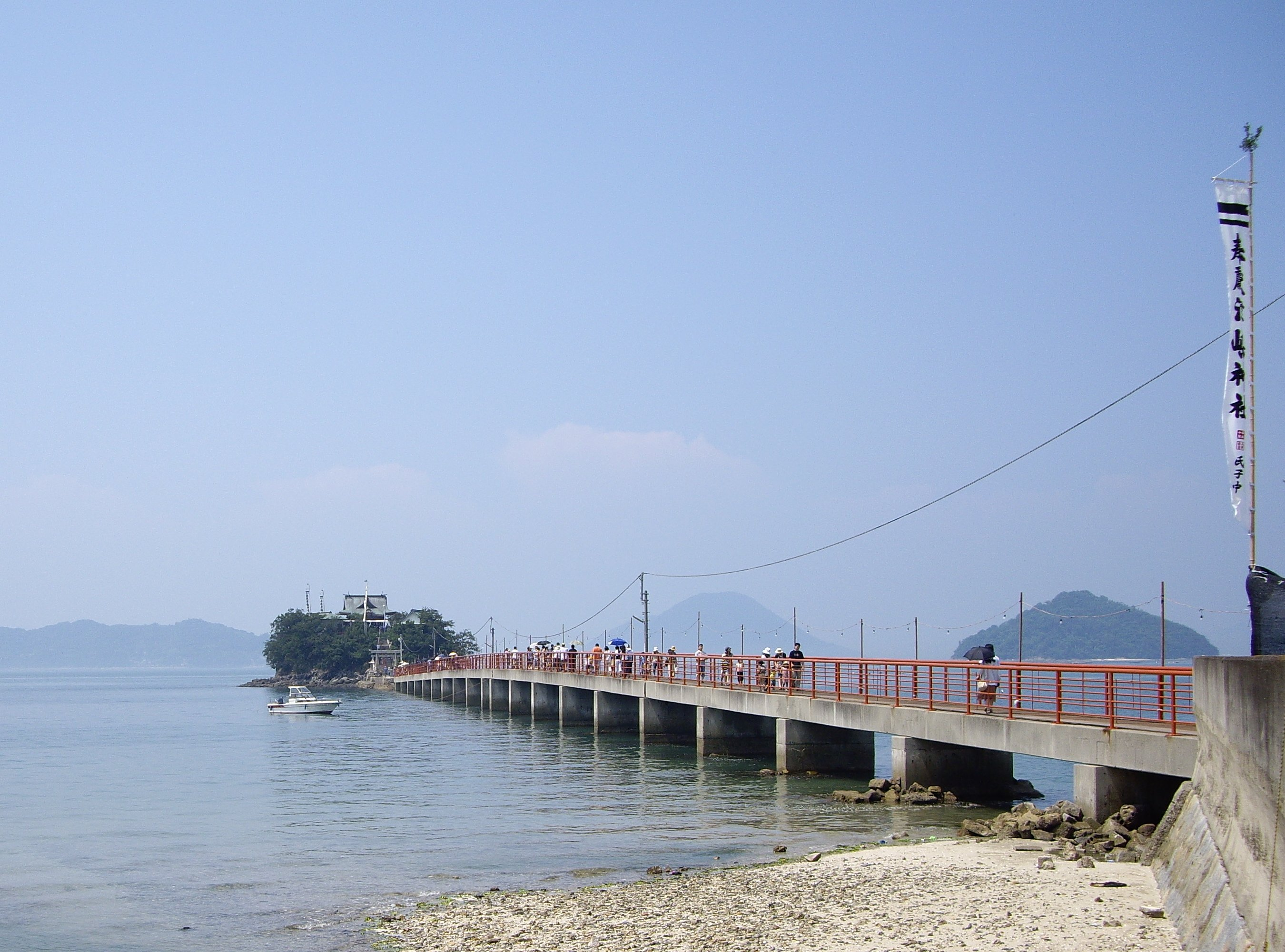 津嶋神社 - 香川県三豊市